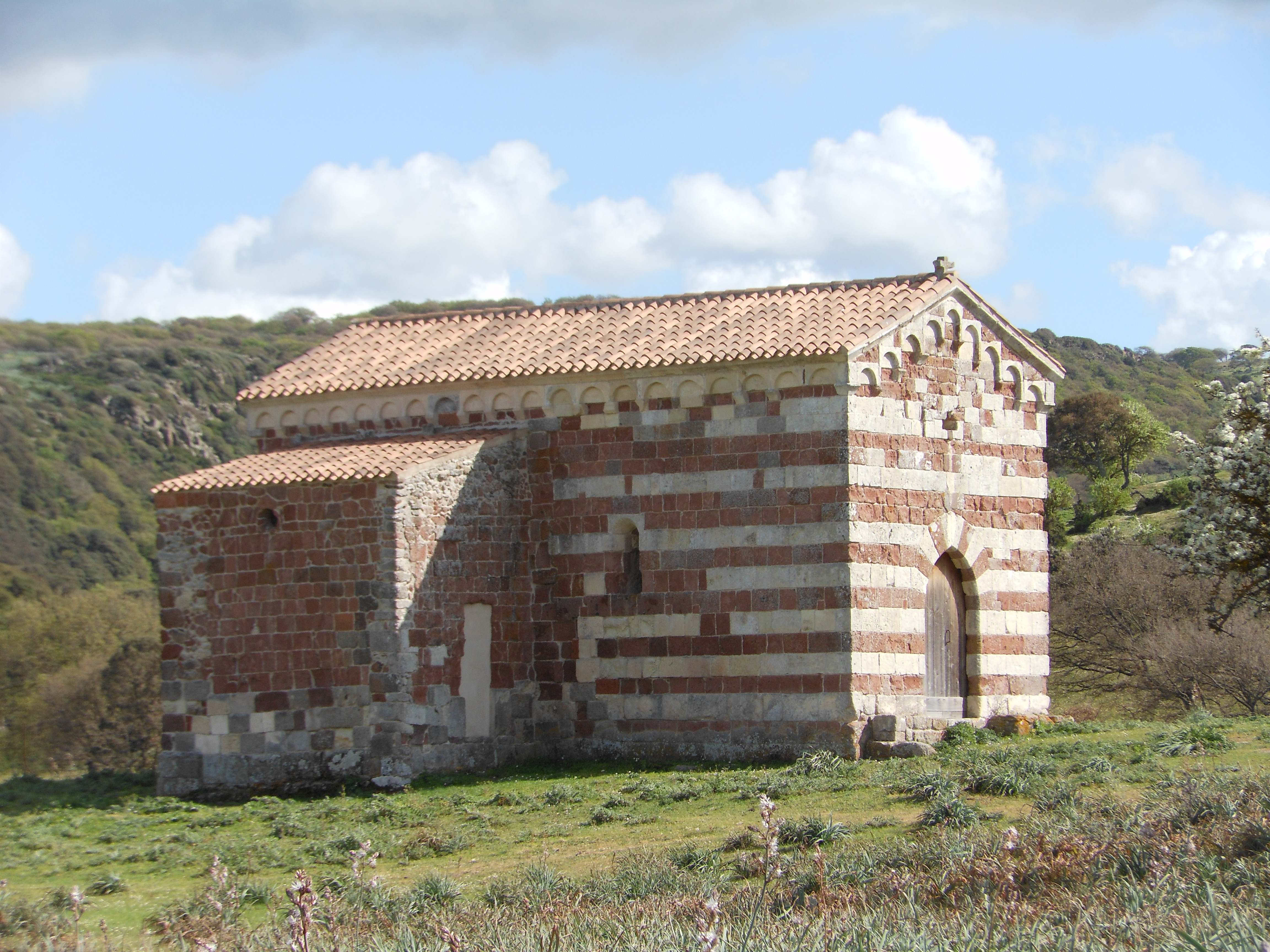 Chiaramonti, Sardegna, Italia